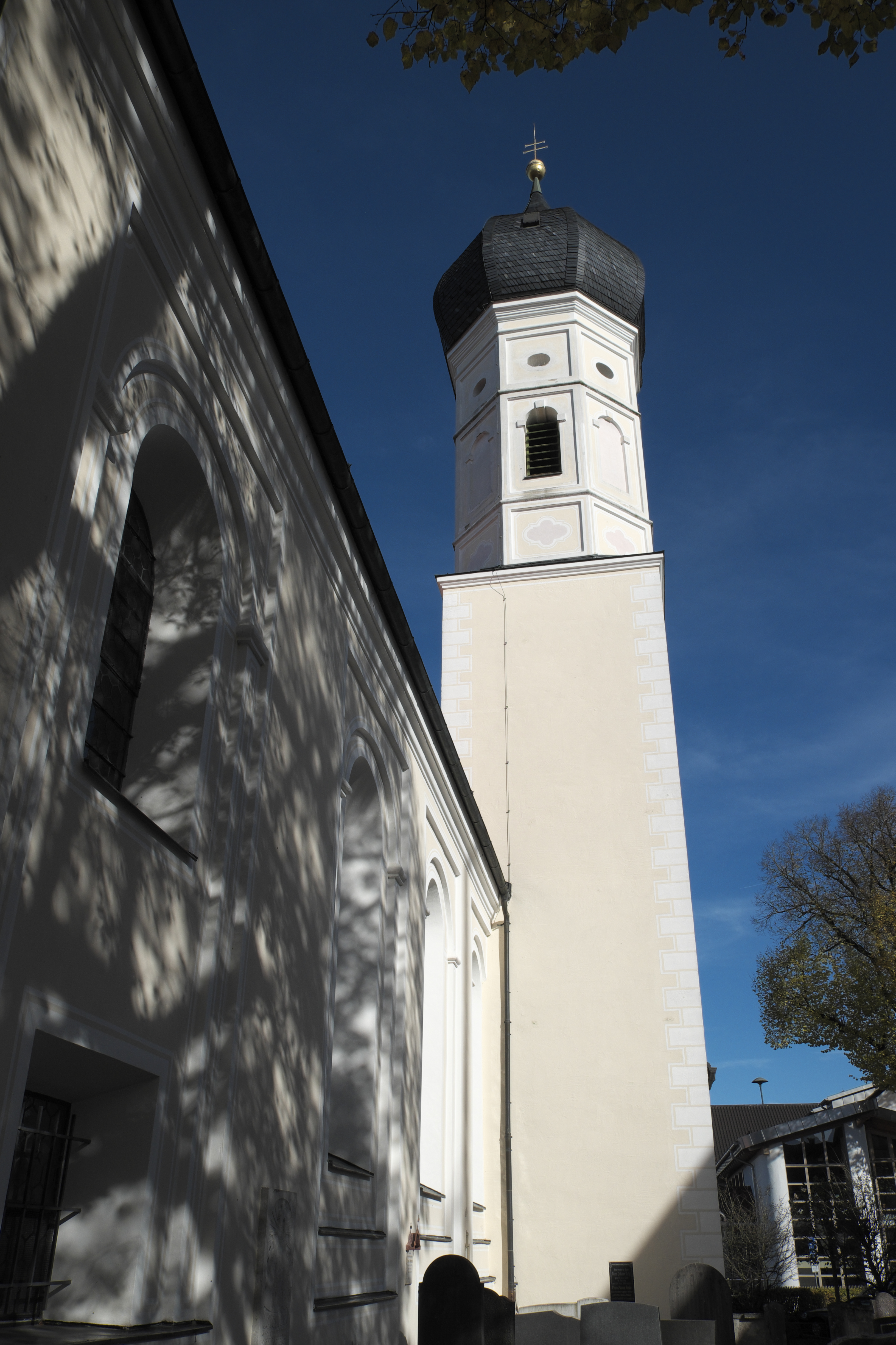 Katholische Pfarrkirche St. Vitus in Iffeldorf im Landkreis Weilheim-Schongau (Bayern/Deutschland), Turm mit Zwiebelhaube